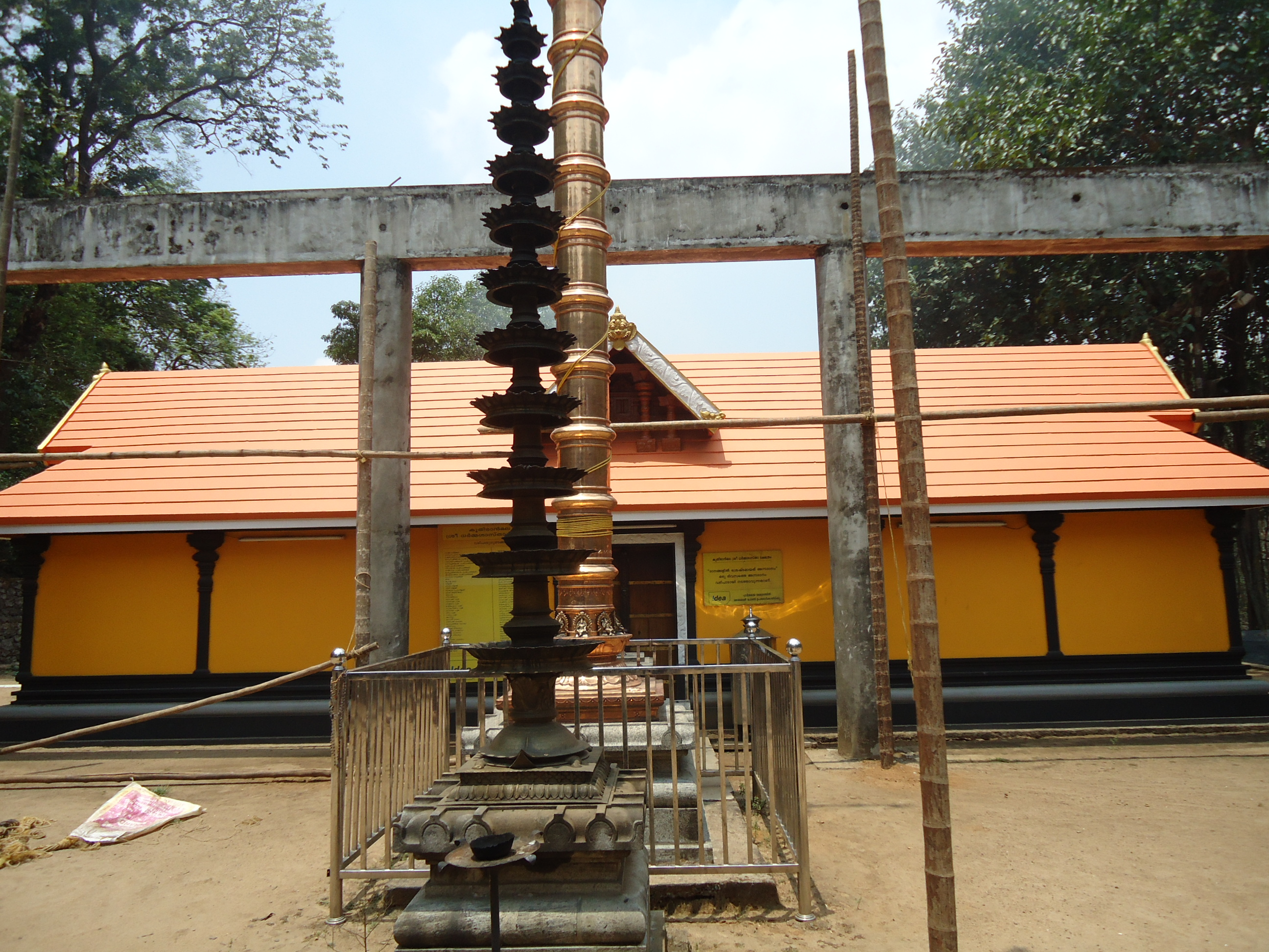 Kuthiranmala Sree dharmasastha TEmple